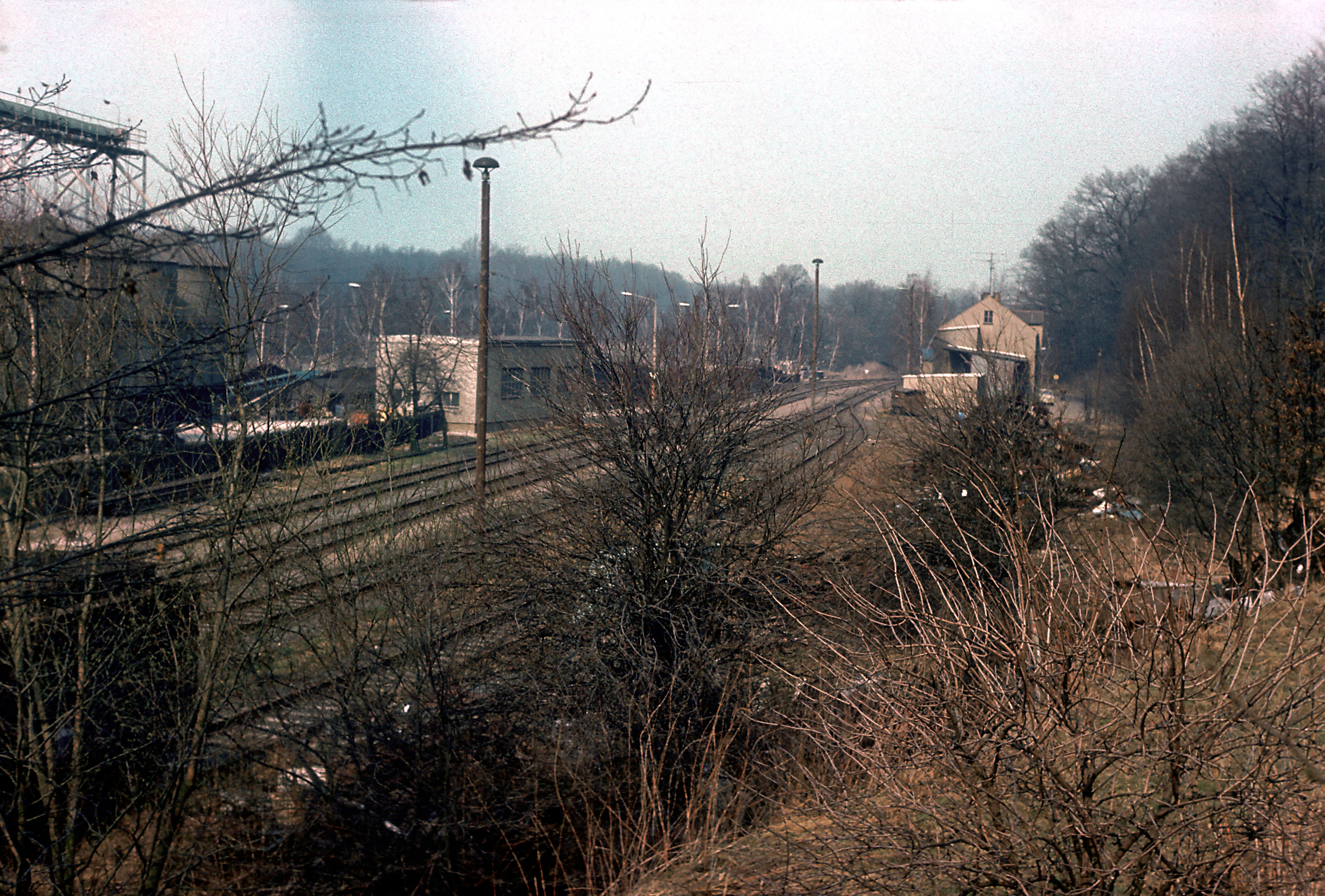 Seit 1969 ohne Reiseverkehr, seit 1974 Endpunkt der Muldentalbahn von Wurzen, nach 2000 ganz abgebaut.